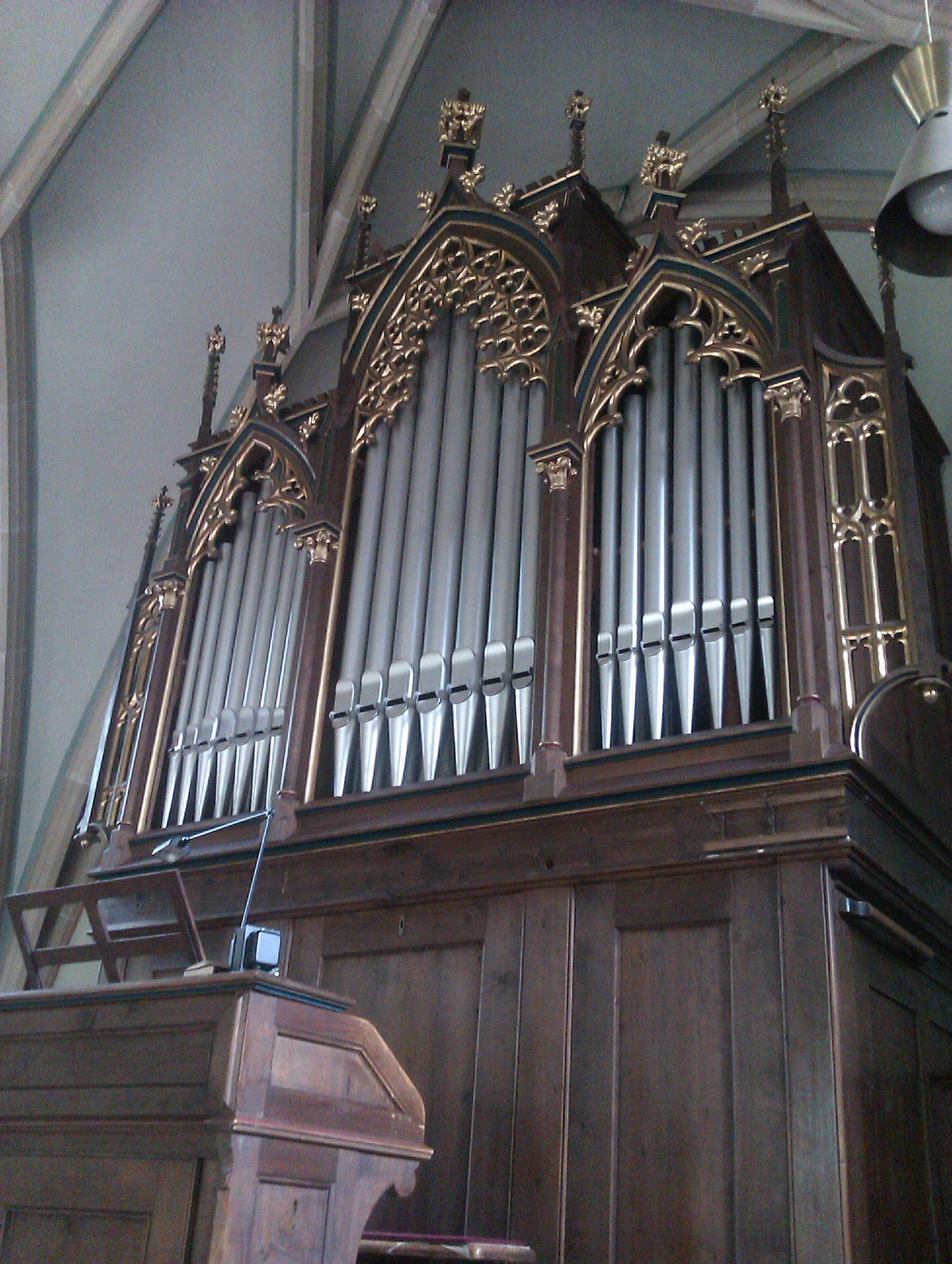 Albert Mauracher Orgel Nußdorf am Hausberg 1913